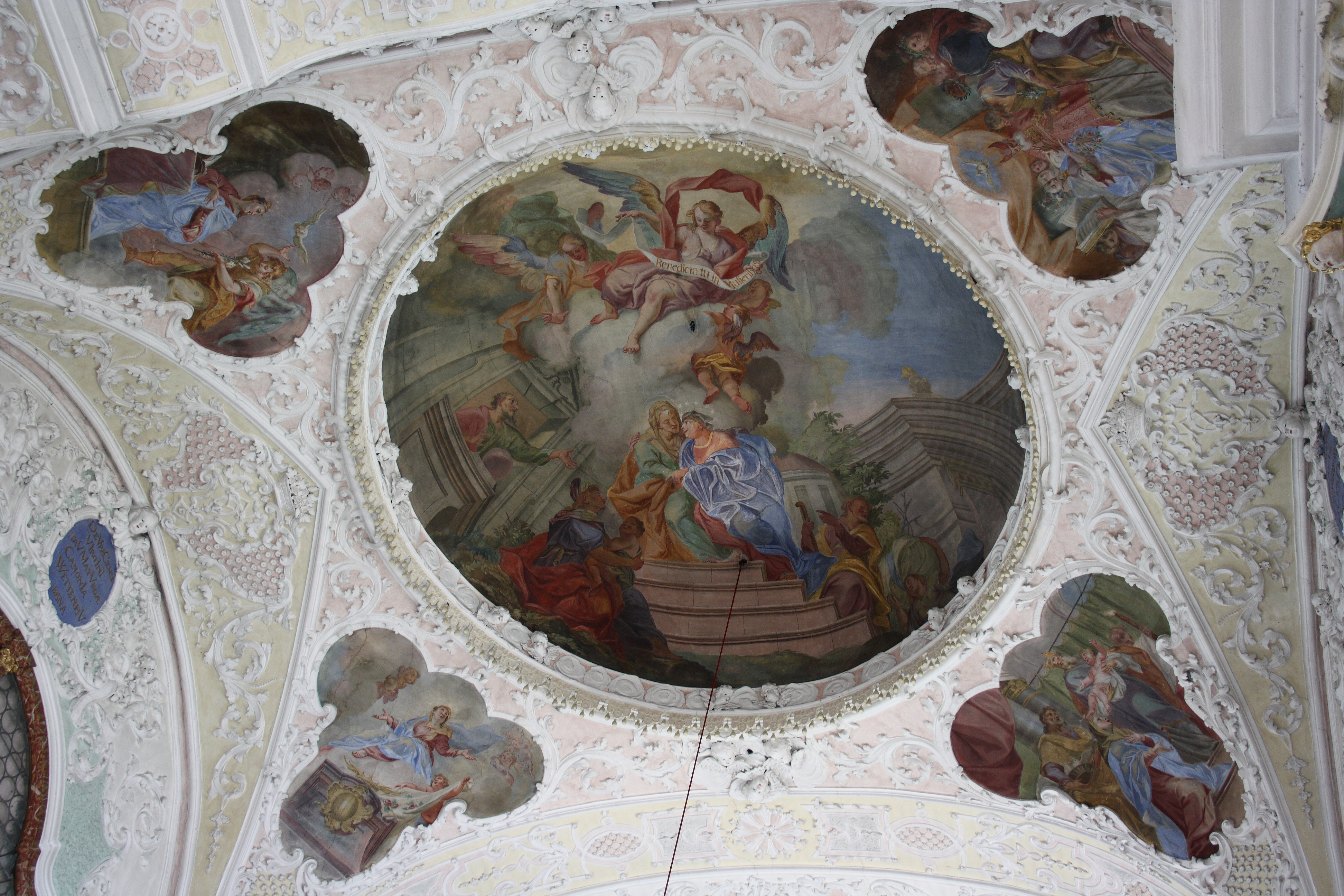 Katholische Pfarrkirche St. Martin in Deubach, einem Stadtteil von Ichenhausen im Landkreis Günzburg (Bayern), 1739/40 von Johann Martin Kraemer errichtet, Stuckdekor, wohl von Johann Martin Kraemer, Chorfresko mit der Darstellung der Heimsuchung